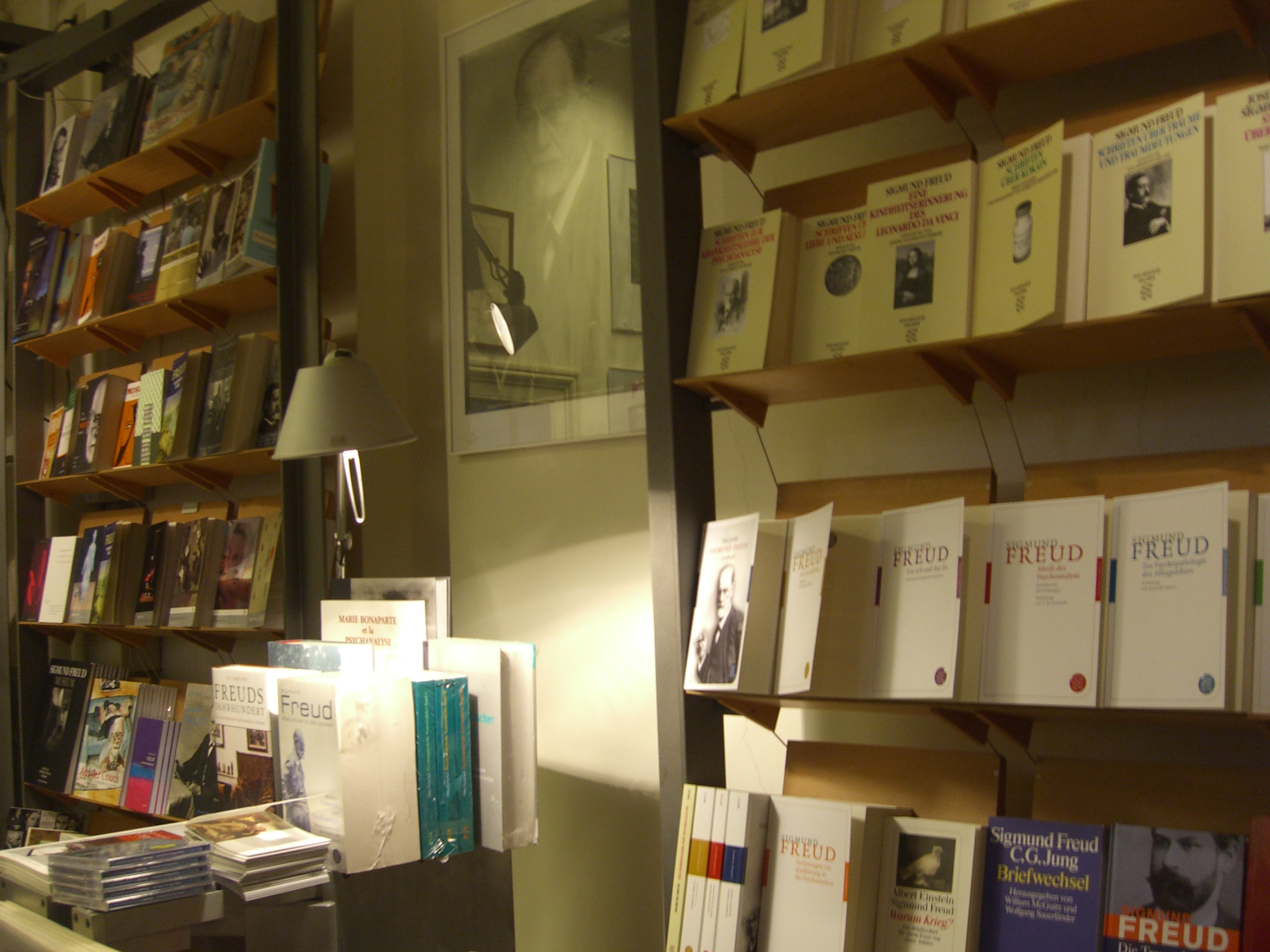 Librería del Museo Sigmund Freud, Berggasse 19, IX Viena.